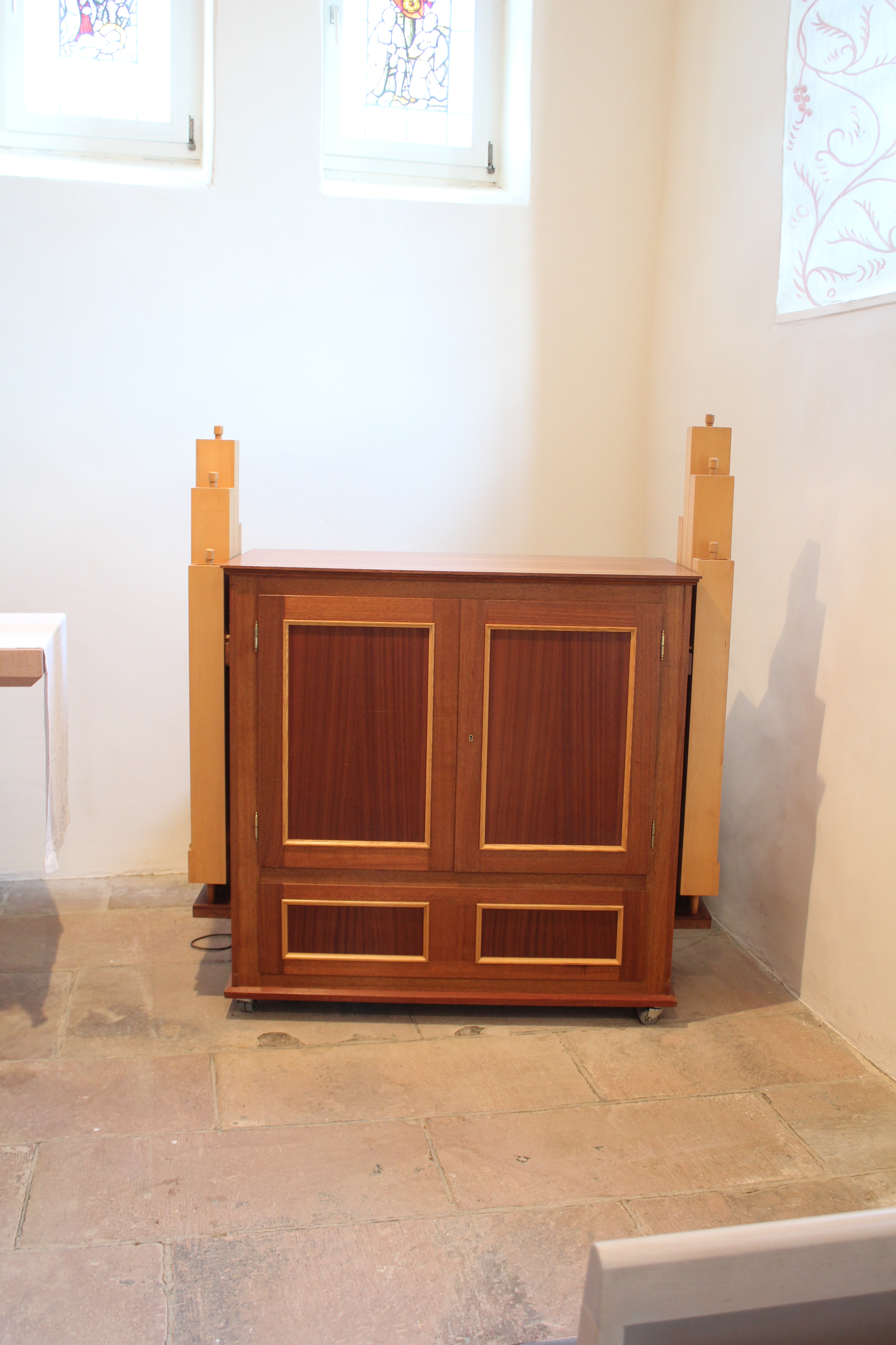 Johanniterkirche Unter-Lais, Nidda, Wetteraukreis, Hessen, Deutschland